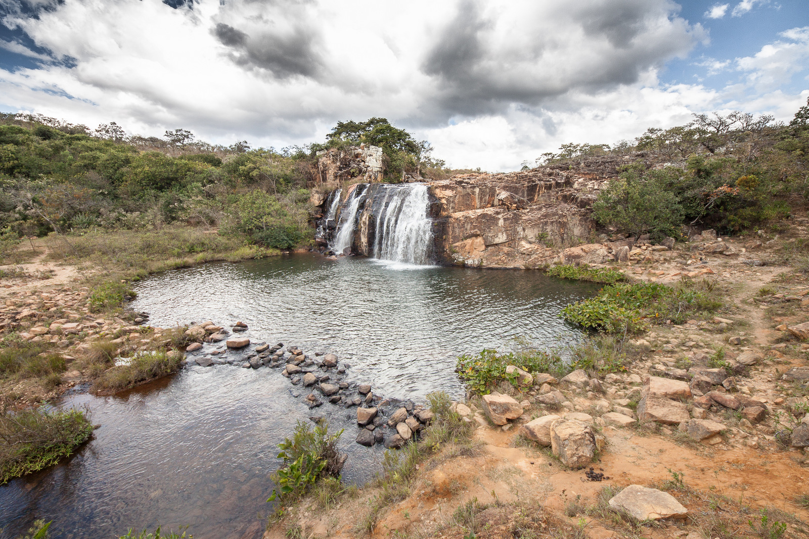 Rio de cruza o distrito de Barão de Guaiçuí em Gouveia - MG